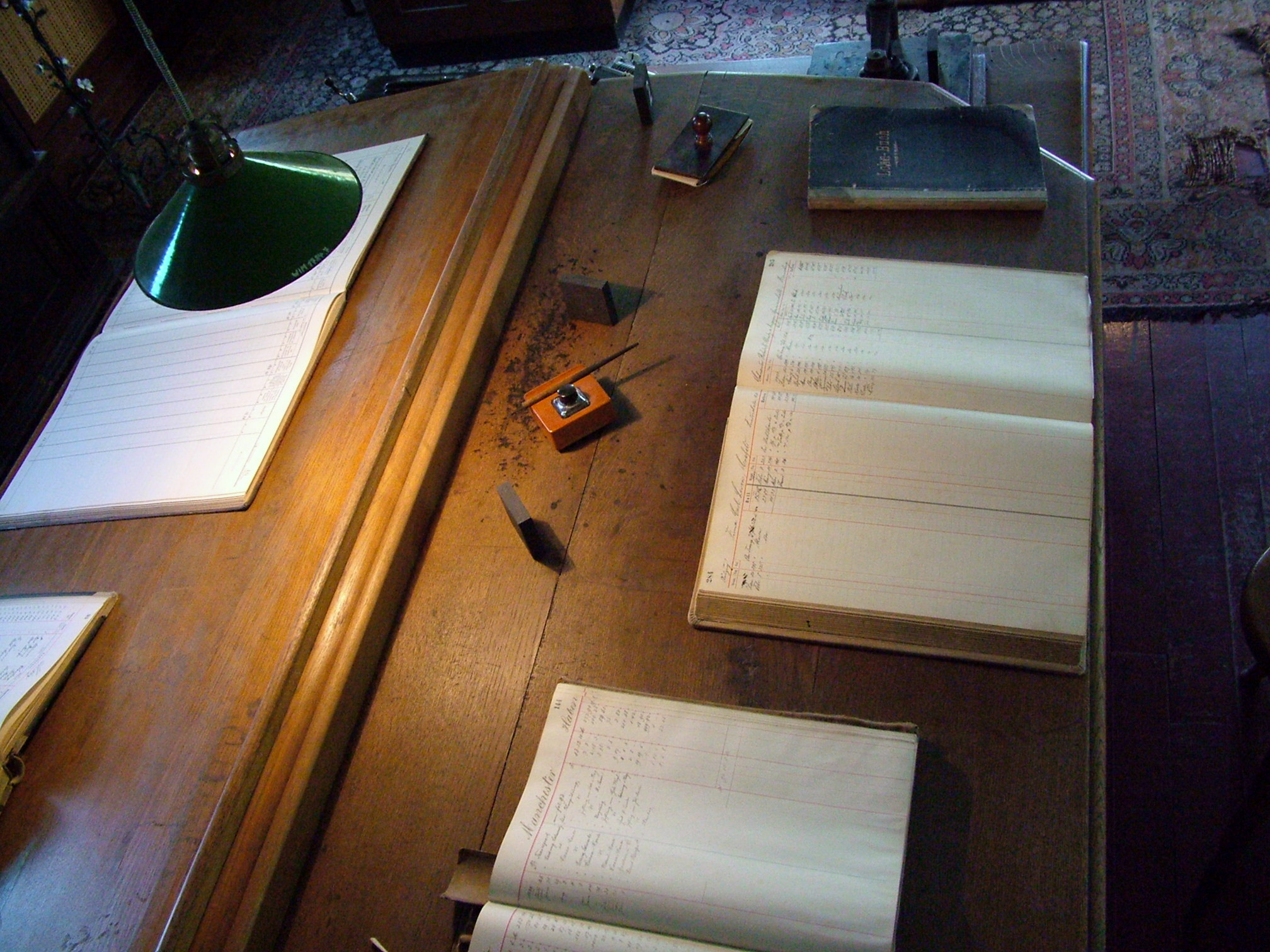 Textilmuseum Bocholt, Schreibtisch mit Rechnungsbuch, um 1910